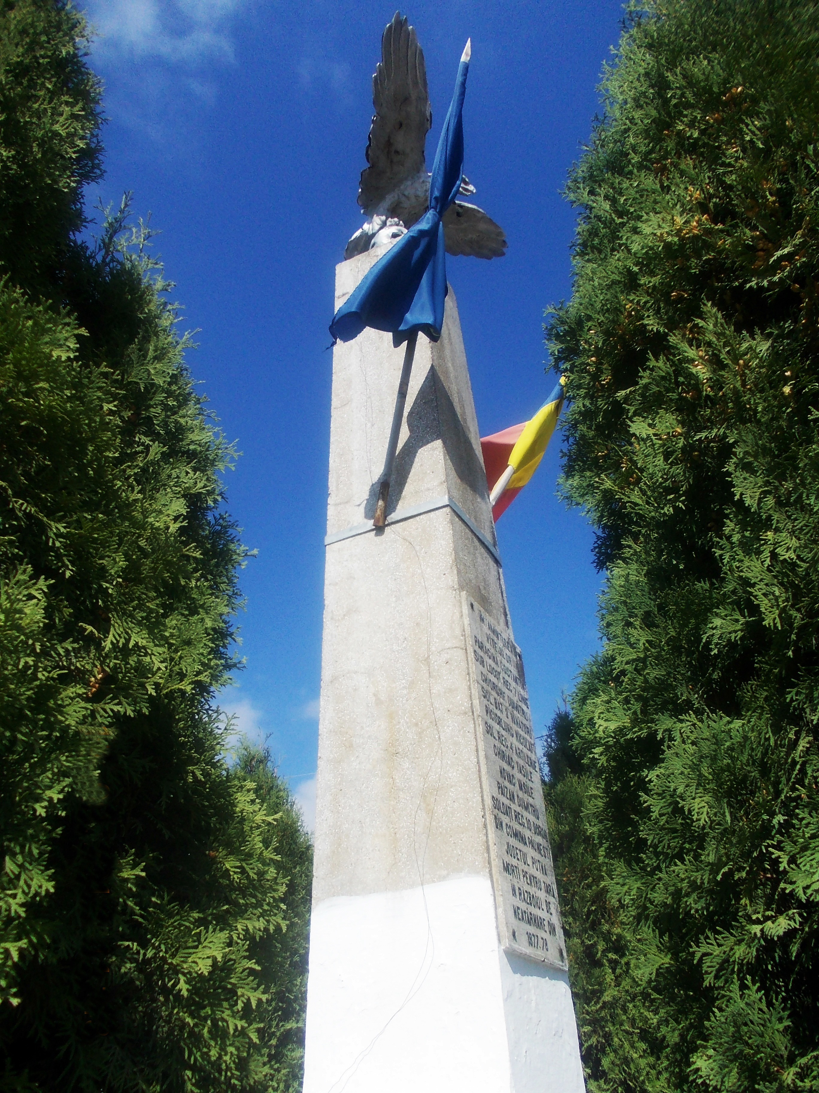 comuna Păunești, la Vest de biserică